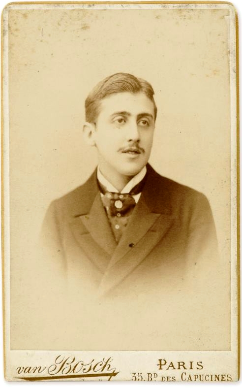 Marcel Proust, photographie vers 1891. Carton au format carte de visite du photographe Paul Boyer (successeur de Van Bosh en 1888). Collection Mantes-Proust, vente Sotheby's, Paris 31 mai 2016 (n°142).